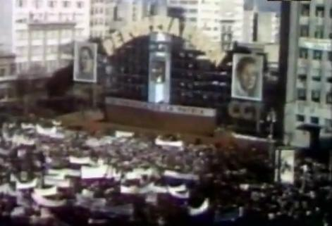 Vista a color tomada de una filmación de época el día del renunciamiento de Eva Duarte de Perón "Evita" a la vicepresidencia de la Argentina, en un escenario montado junto al edificio del Ministerio de Obras Públicas